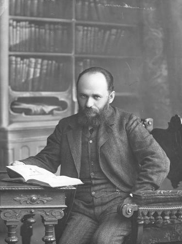 Винавер, Максим Моисеевич - депутат Государственной думы 1-го созыва от Петербургской губернии.